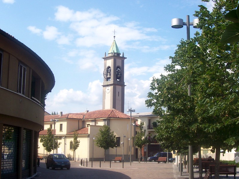 Burago di Molgora - Chiesa Parrocchiale dei Ss. Vito e Modesto